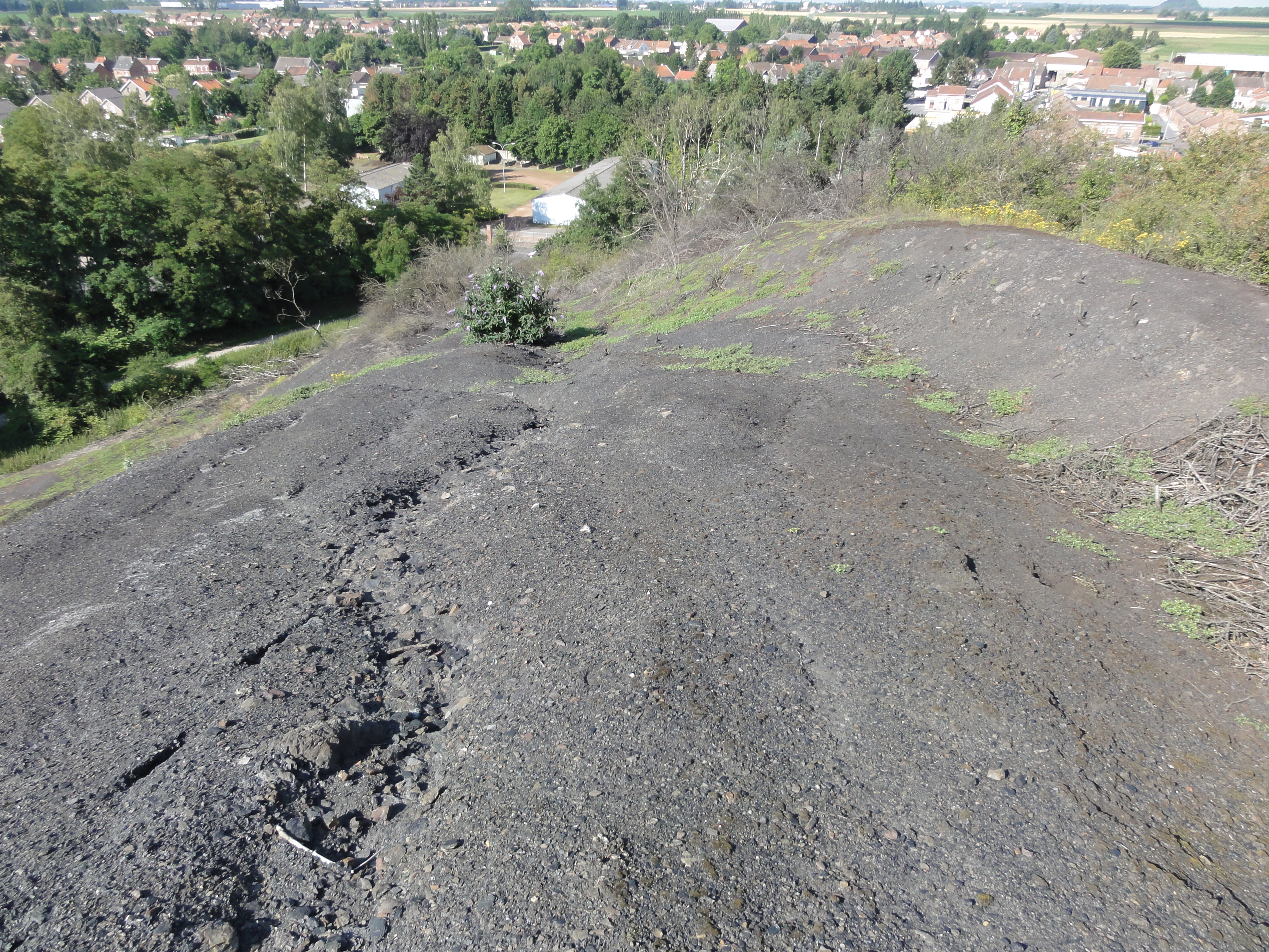 Terril n° 157 dit Haveluy Nord, fosse d'Haveluy de la Compagnie des mines d'Anzin dans le bassin minier du Nord-Pas-de-Calais, Haveluy, Nord, Nord-Pas-de-Calais, France. Le terril no 157 est inscrit sur la liste du patrimoine mondial de l'Unesco le 30 juin 2012 et y constitue en partie le site no 15.